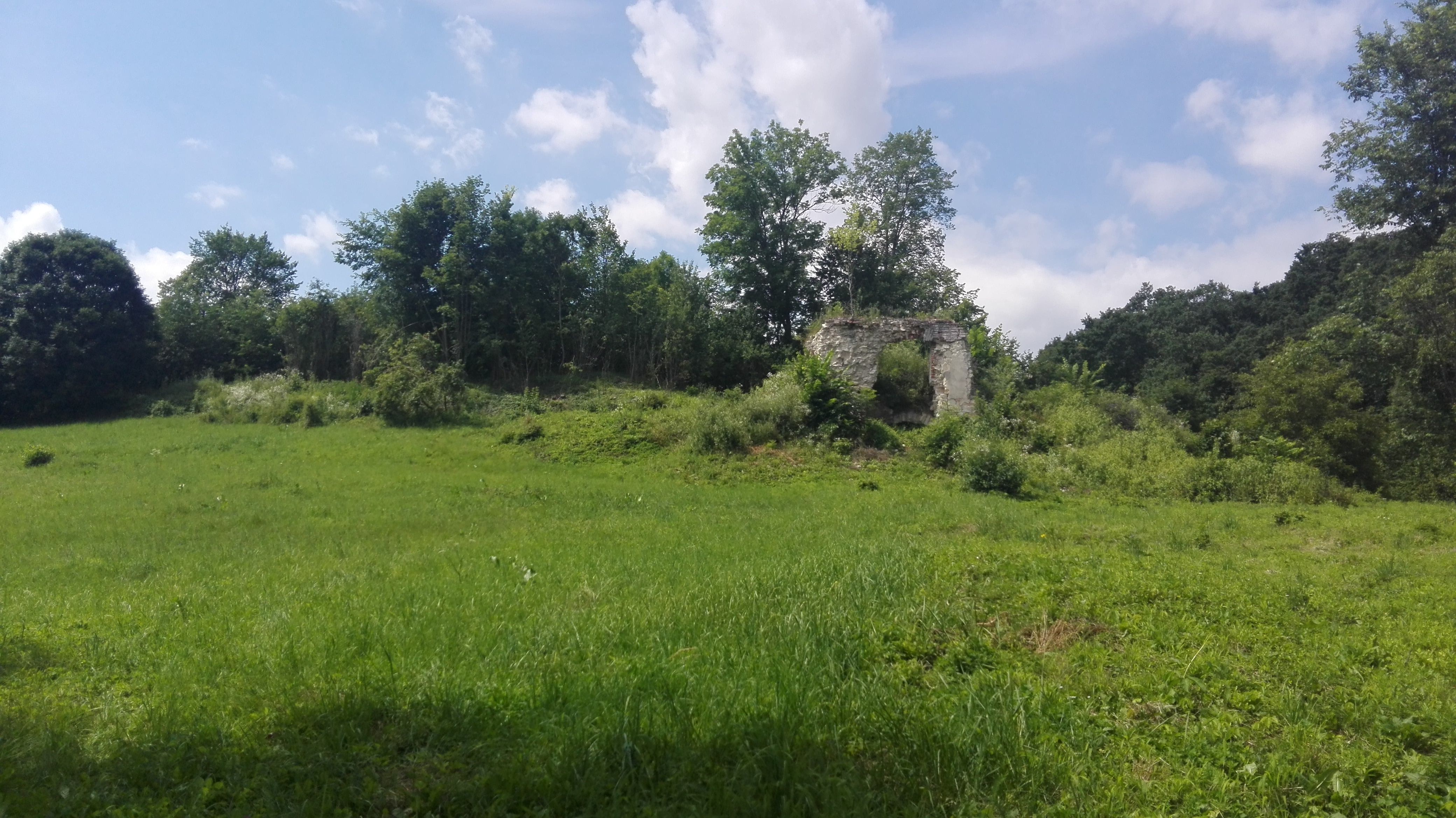 Ruiny wieży zamkowej z 2 połowy XIV wieku, przebudowanej w XVI wieku.